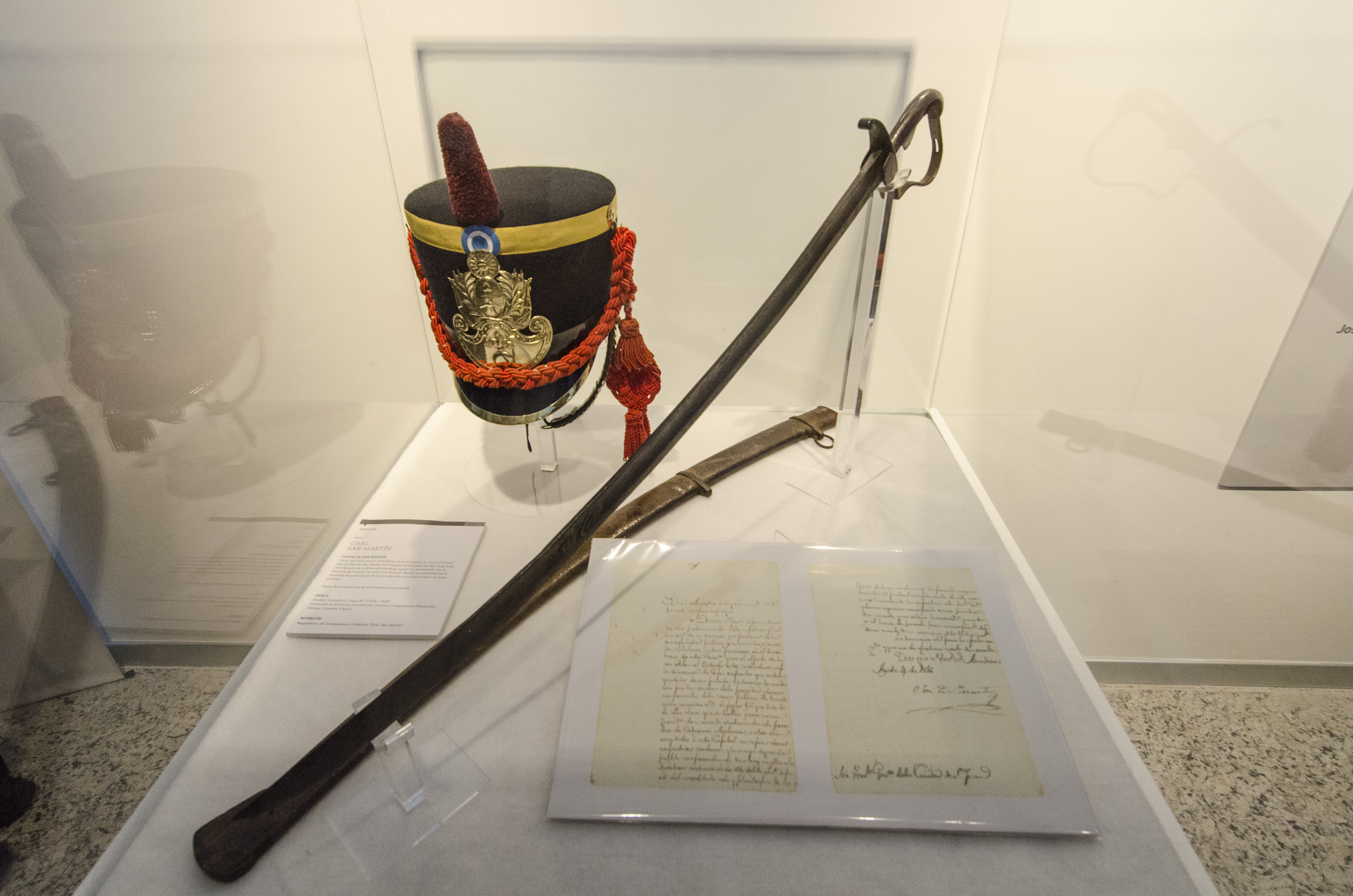 Buenos Aires, 17 de agosto de 2014 - El Museo Malvinas festejó el 17 de agosto con la incorporación de una carta de 1816 en la que San Martín se refiere a la posesión argentina sobre las islas. Participaron del homenaje la ministra de Cultura, Teresa Parodi; el Secretario de Gestión Cultural de la Nación, Sebastián Schonfeld; el director del Museo Malvinas, Jorge Giles; el secretario de Asuntos Relativos a las Islas Malvinas de la Cancillería,Daniel Filmus; ex combatiente, periodista, Edgardo Esteban y el ex combatiente y vicedirector del Museo Malvinas, Mario Volpe. Fotos: Romina Santarelli / Ministerio de cultura de la Nación